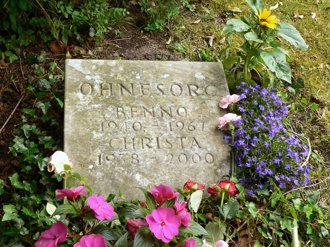 Benno Ohnesorg Grabplatte 50. Todestag